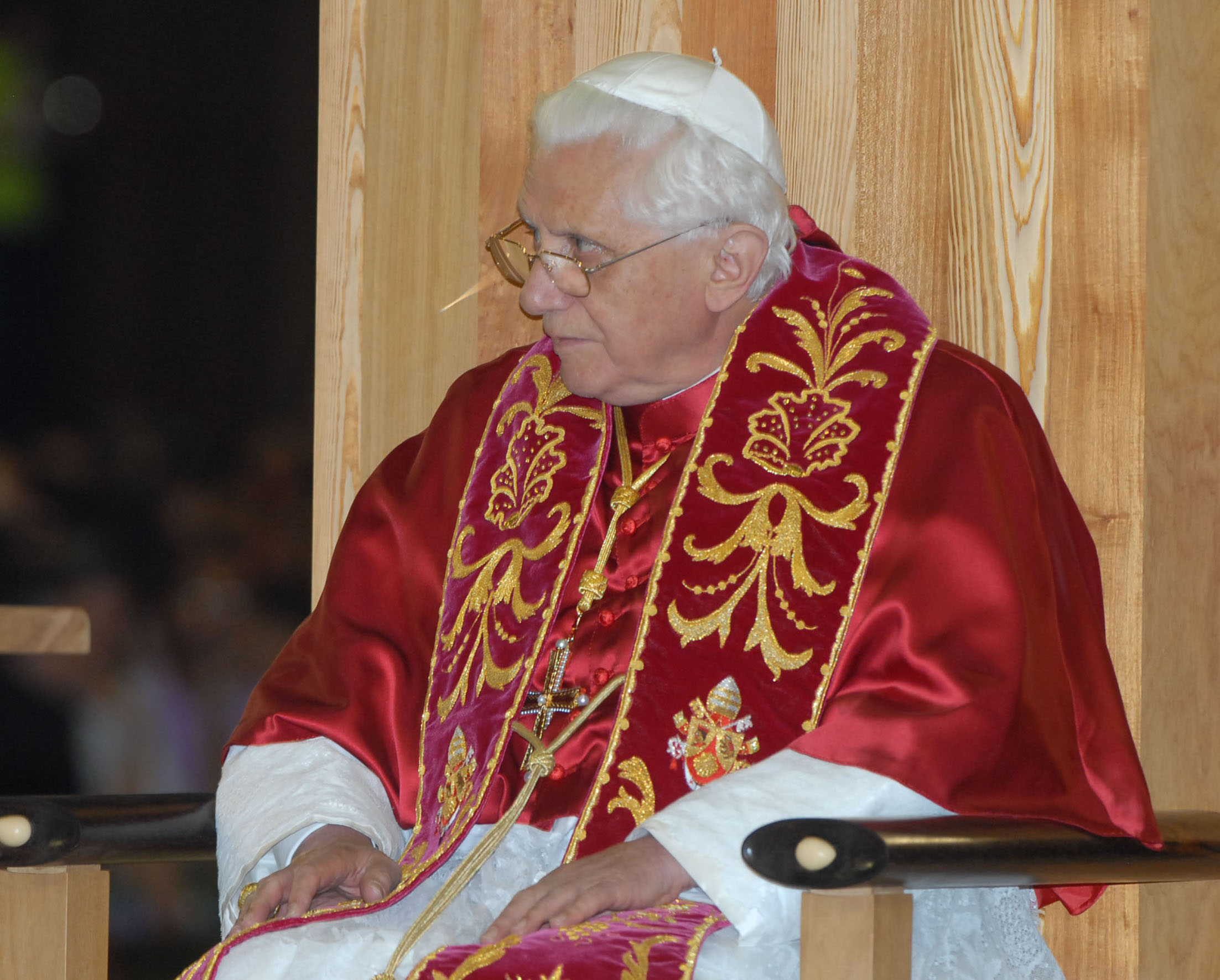 Papa Bento XVI durante cerimônia religiosa na Basílica de Nossa Senhora Aparecida, no interior do estado de São Paulo, Brasil.